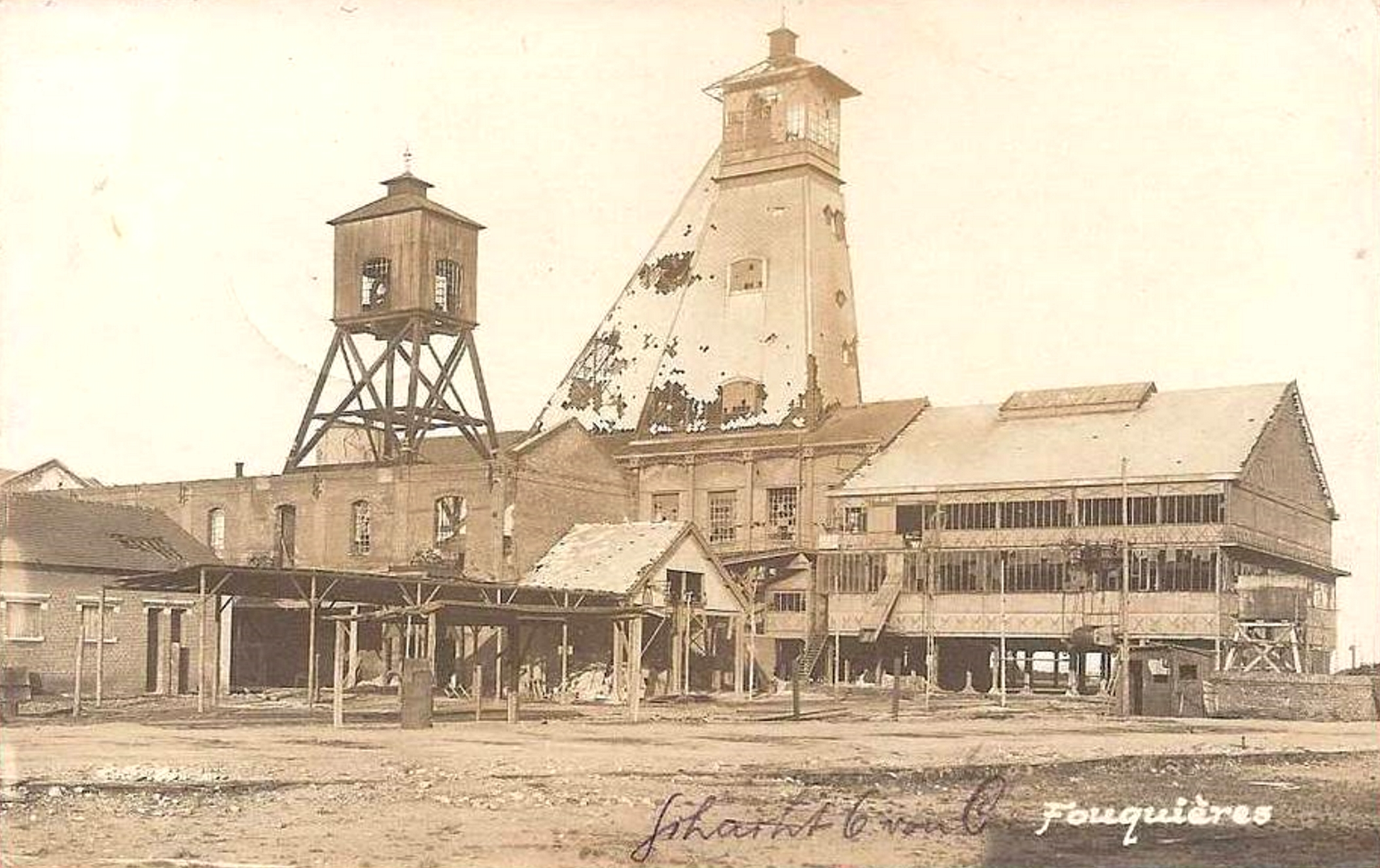 La Fosse n° 6 - 14 dite Alfred Dupont de la Compagnie des mines de Courrières était un charbonnage constitué de deux puits situé à Fouquières-lez-Lens, Pas-de-Calais, Nord-Pas-de-Calais, France.